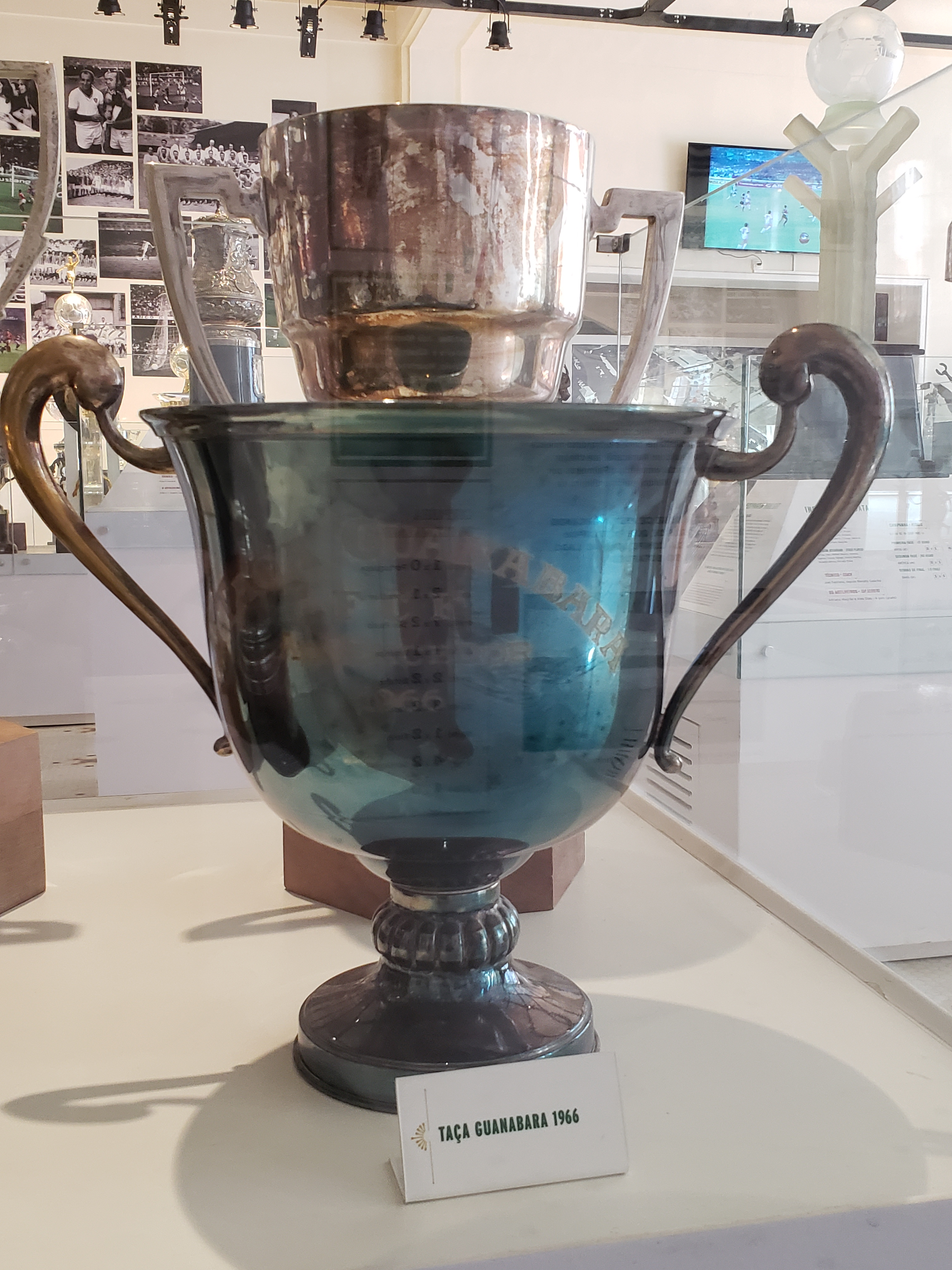 Taça Guanabara de 1966, conquistada pelo Fluminense Football Club.